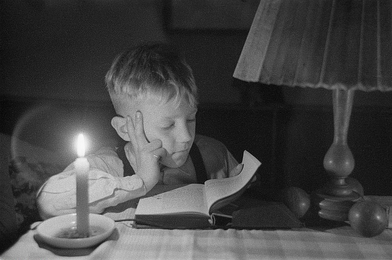 Original image description from the Deutsche FotothekStromsperre in der Nachkriegszeit. Lesender Junge an einem Tisch mit Kerze und Lampe